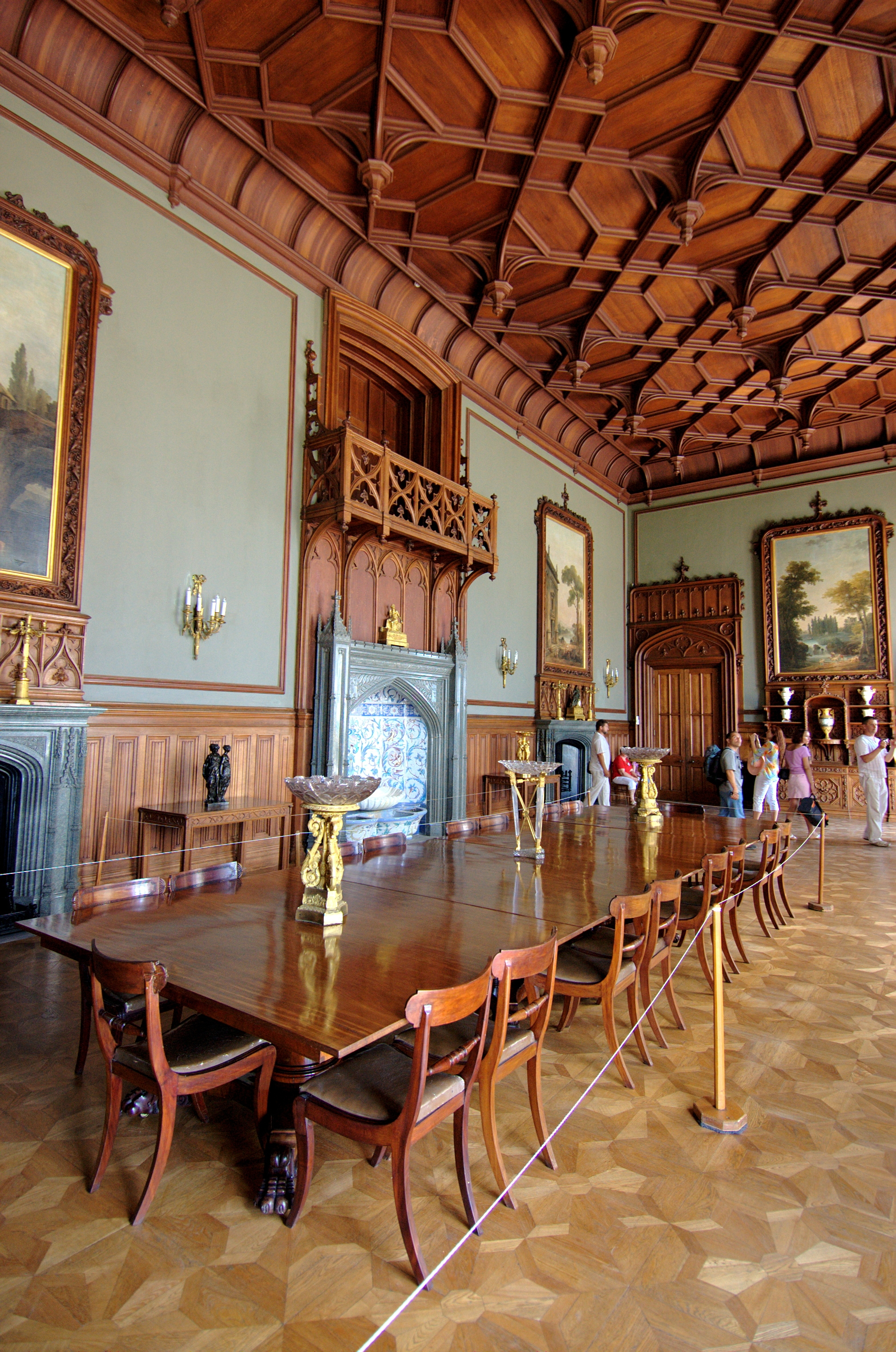 Парадная столовая Воронцовского дворца в Алупке.